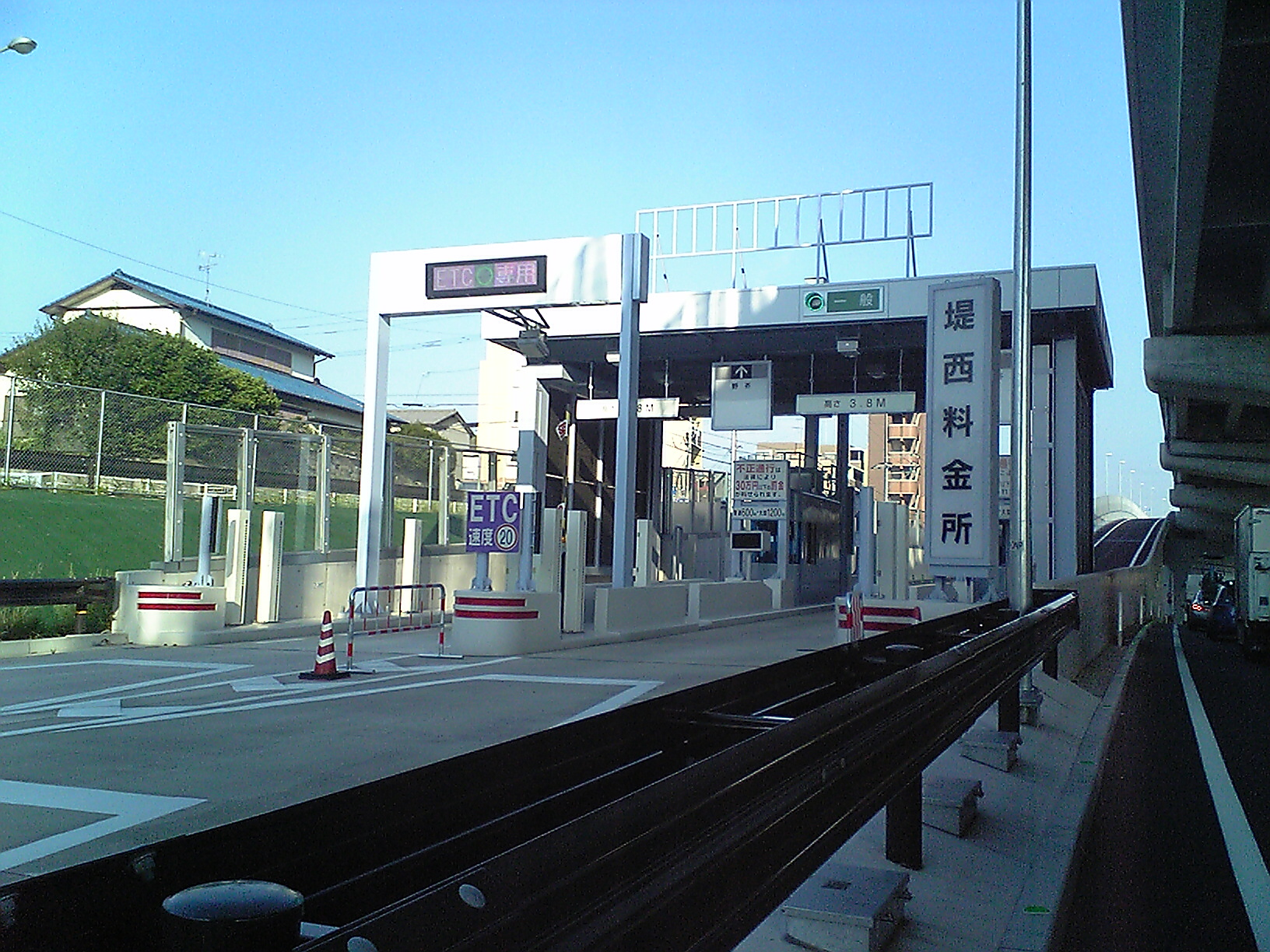 福岡都市高速・堤西料金所（福岡市城南区）